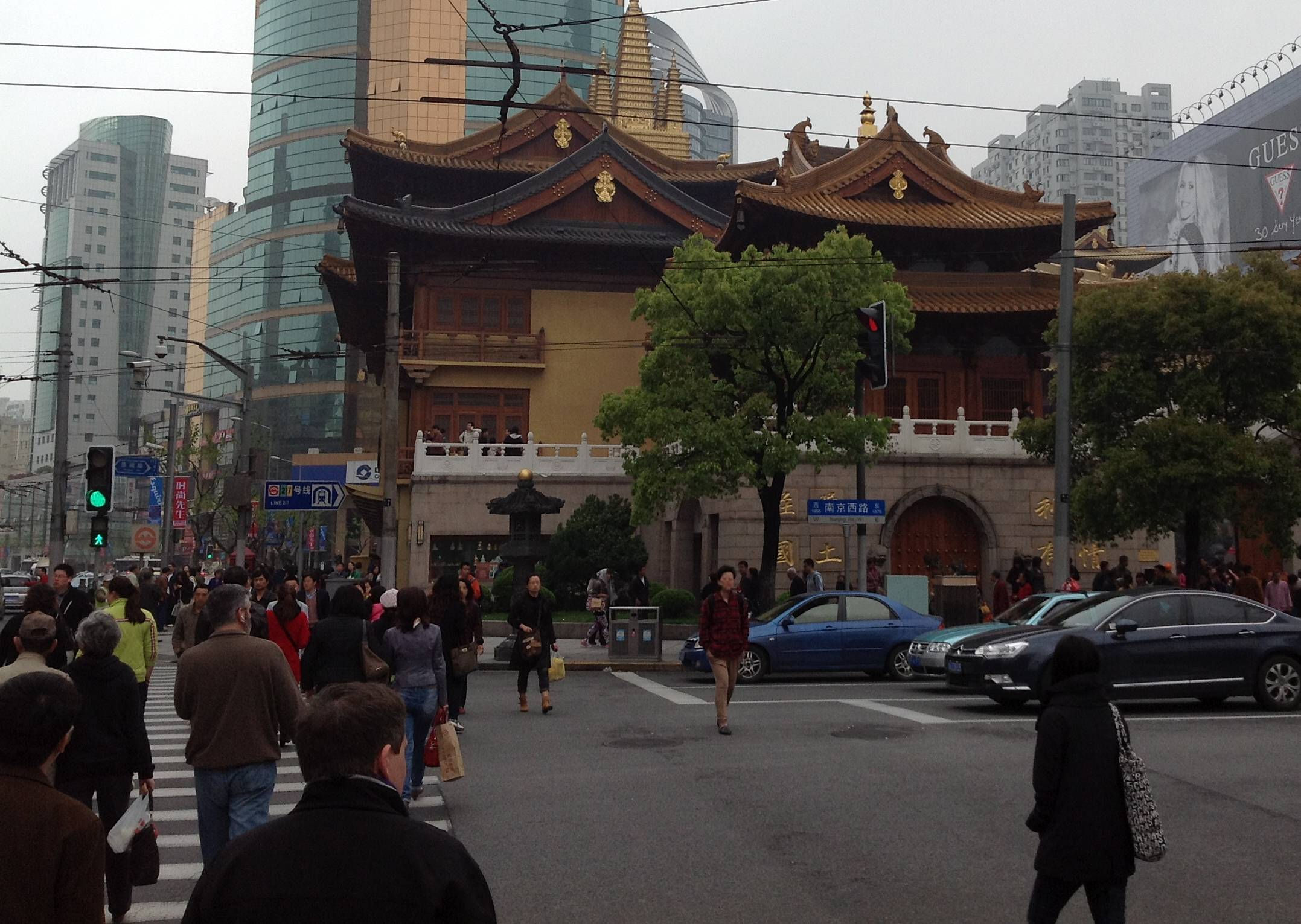 Jing'an Tempel in Shanghai